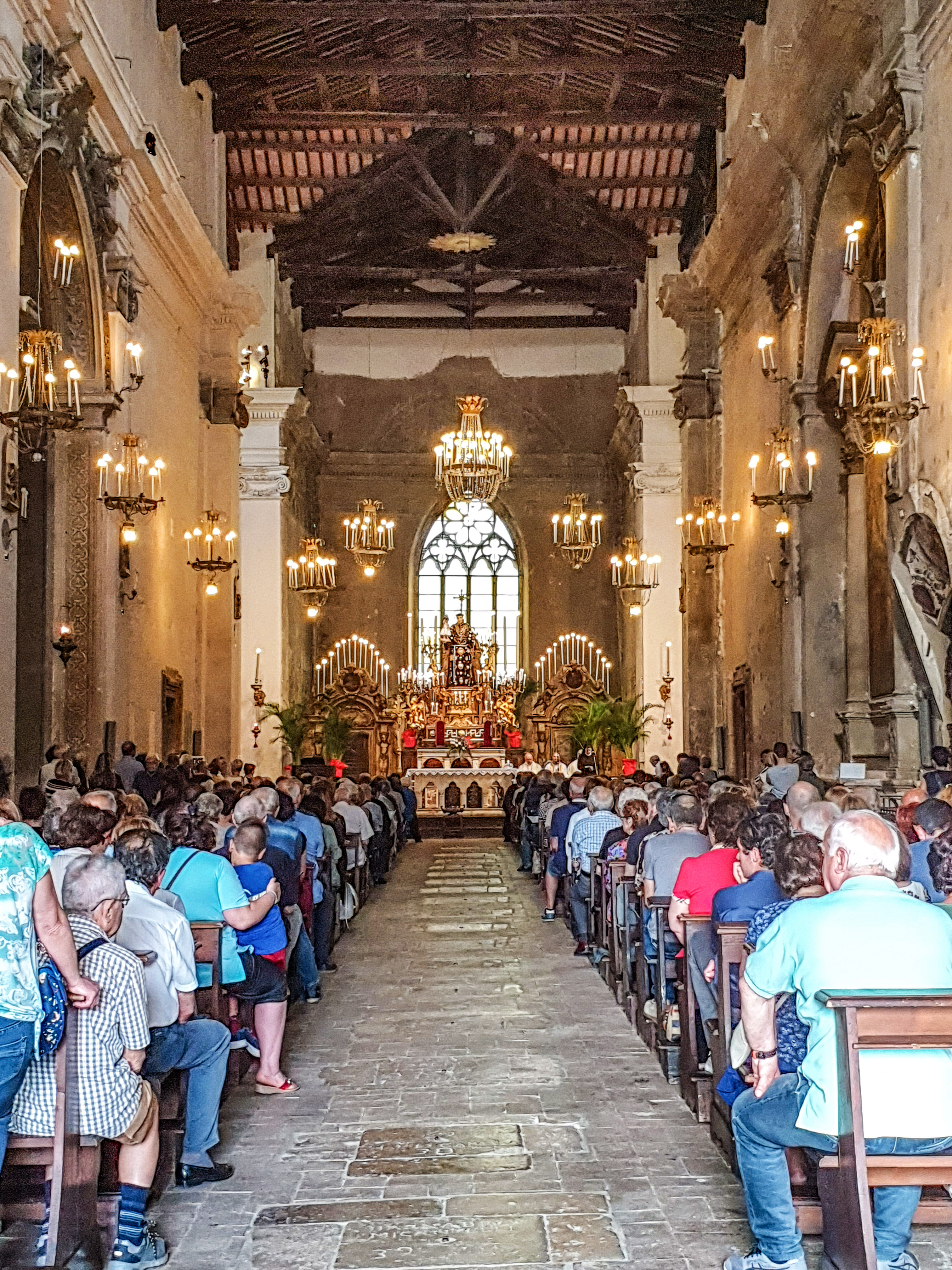 Chiesa di San Francesco in occasione dell'esposizione della Statua del Santo: S. Antonio, che si trova all'interno della Chiesa di S.Francesco ID 12H2820009 This is a photo of a monument which is part of cultural heritage of Italy. Questa è una foto di un bene culturale italiano che partecipa al concorso Wiki Loves Valle del Primo Presepe 2019, gestito in coperazione con Wikimedia Italia. This is a photo of a monument which is part of cultural heritage of Italy. This monument participates in the contest Wiki Loves Valle del Primo Presepe 2019, operated in cooperation with Wikimedia Italia.